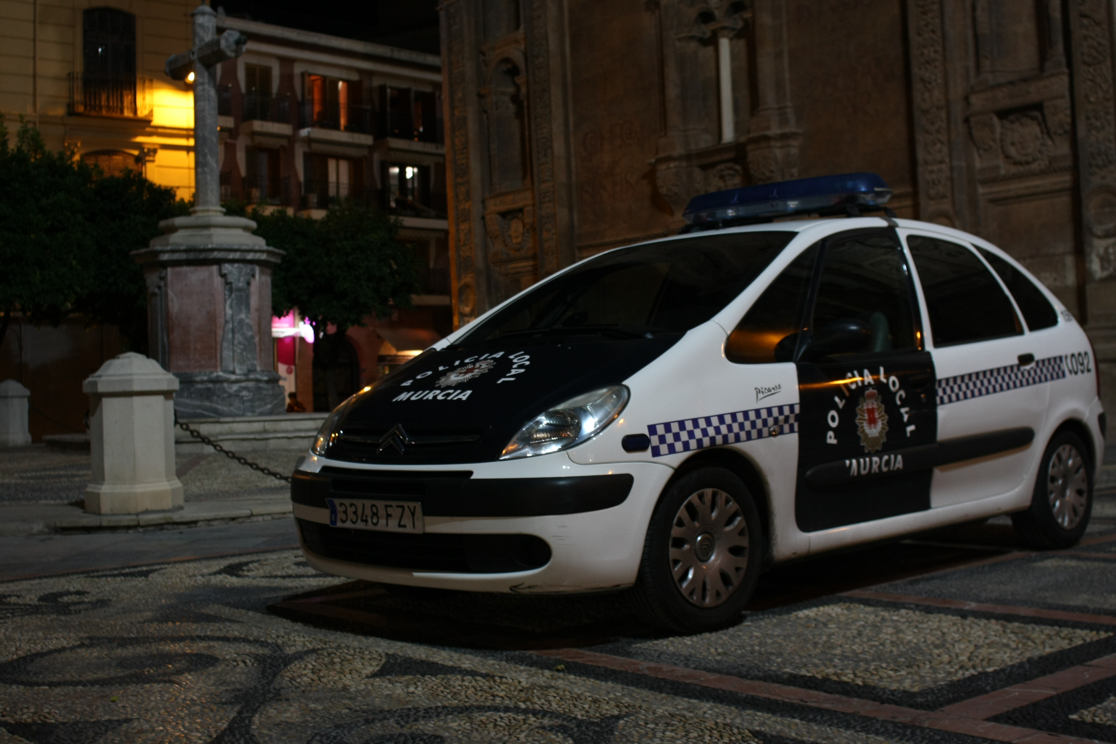 Un coche de la flota de Policía Local de Murcia.